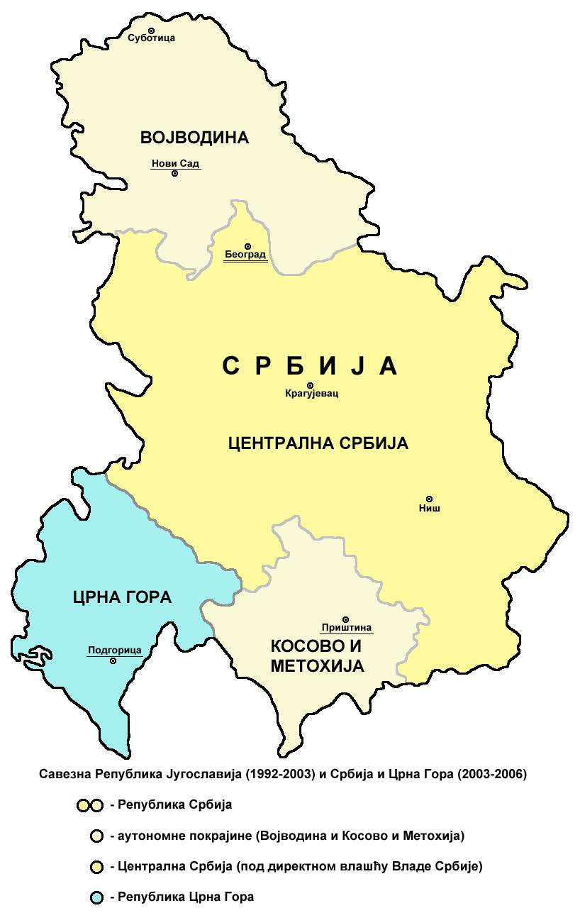 Мапа Савезне Републике Југославије (1992-2003) и Државне Заједнице Србије и Црне Горе (2003-2006).